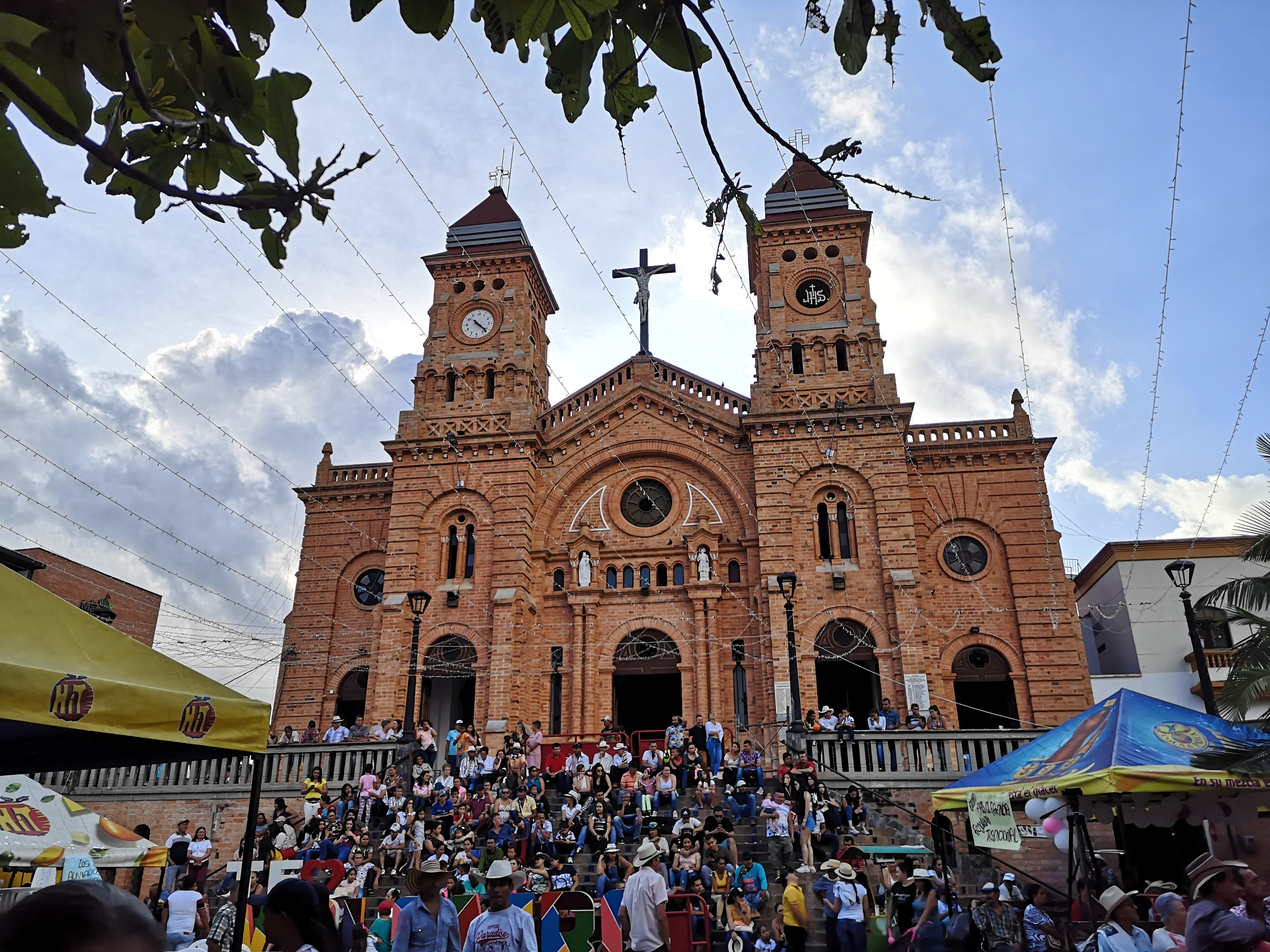 Iglesia de San Lorenzo, Yolombó